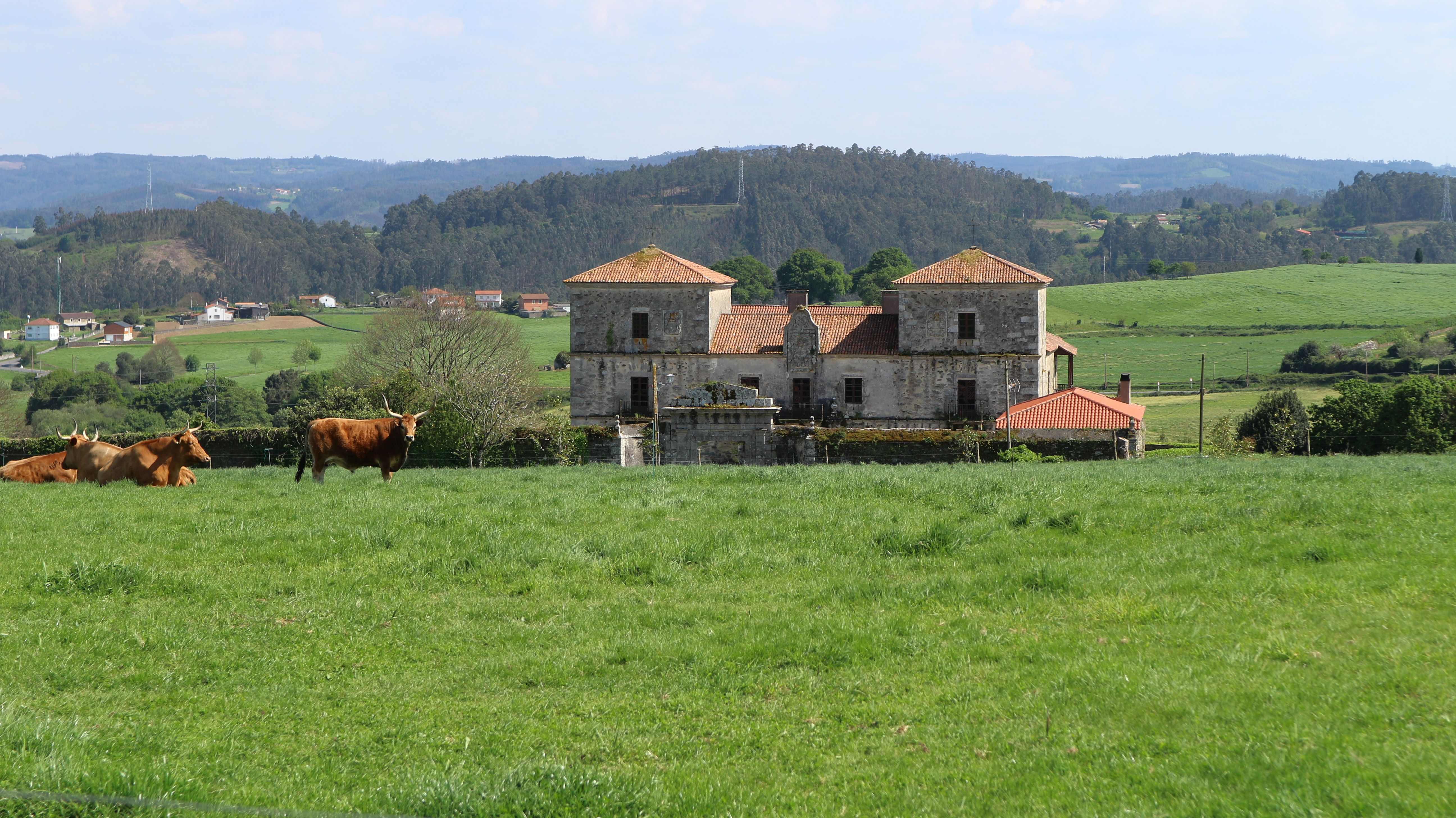 Pazo de Quiroga en Mabegondo, Abegondo.